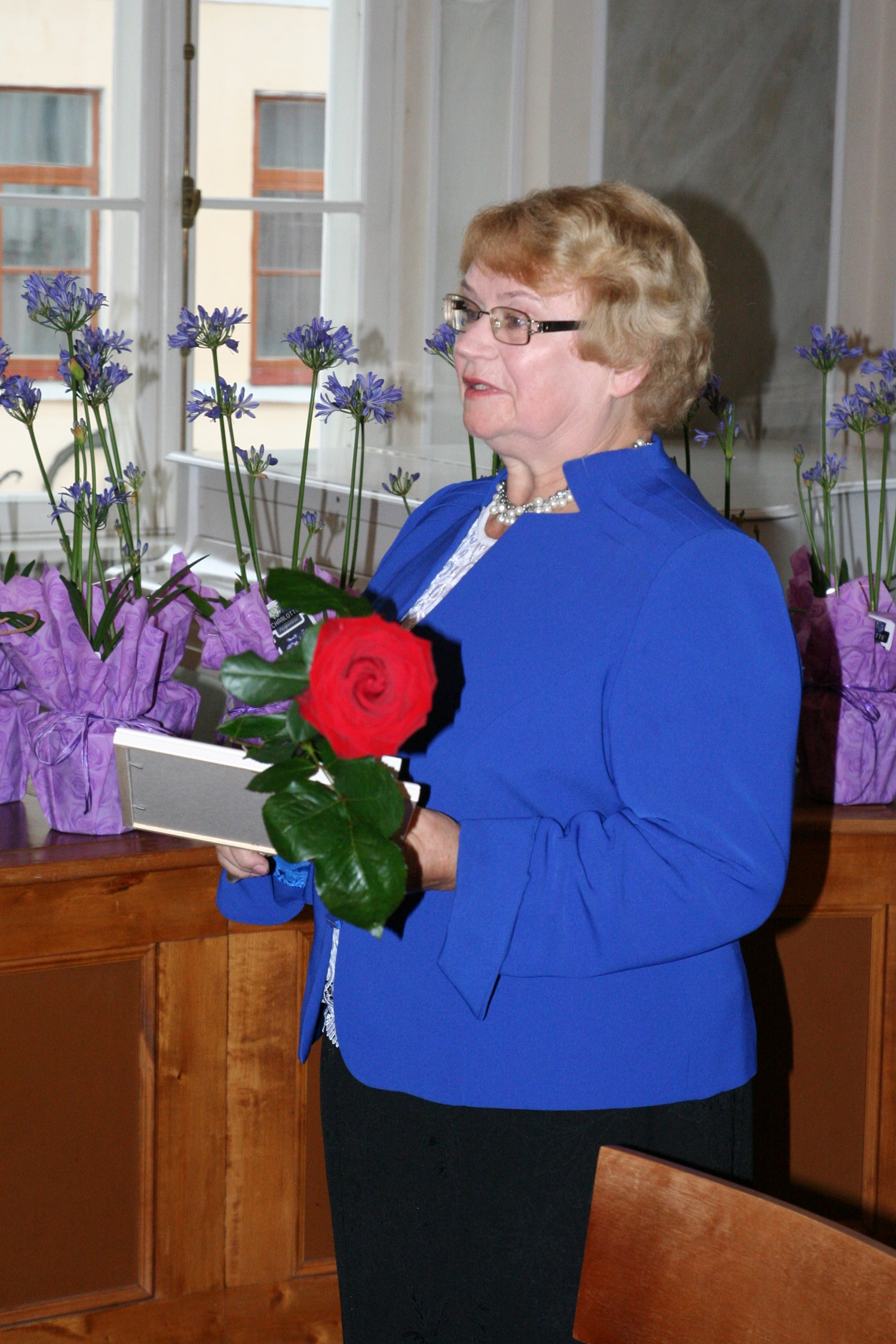 Juta Nugin, Tartu Täiskasvanute Gümnaasiumi direktor, Tartu medalite üleandmisel 29. juunil 2014